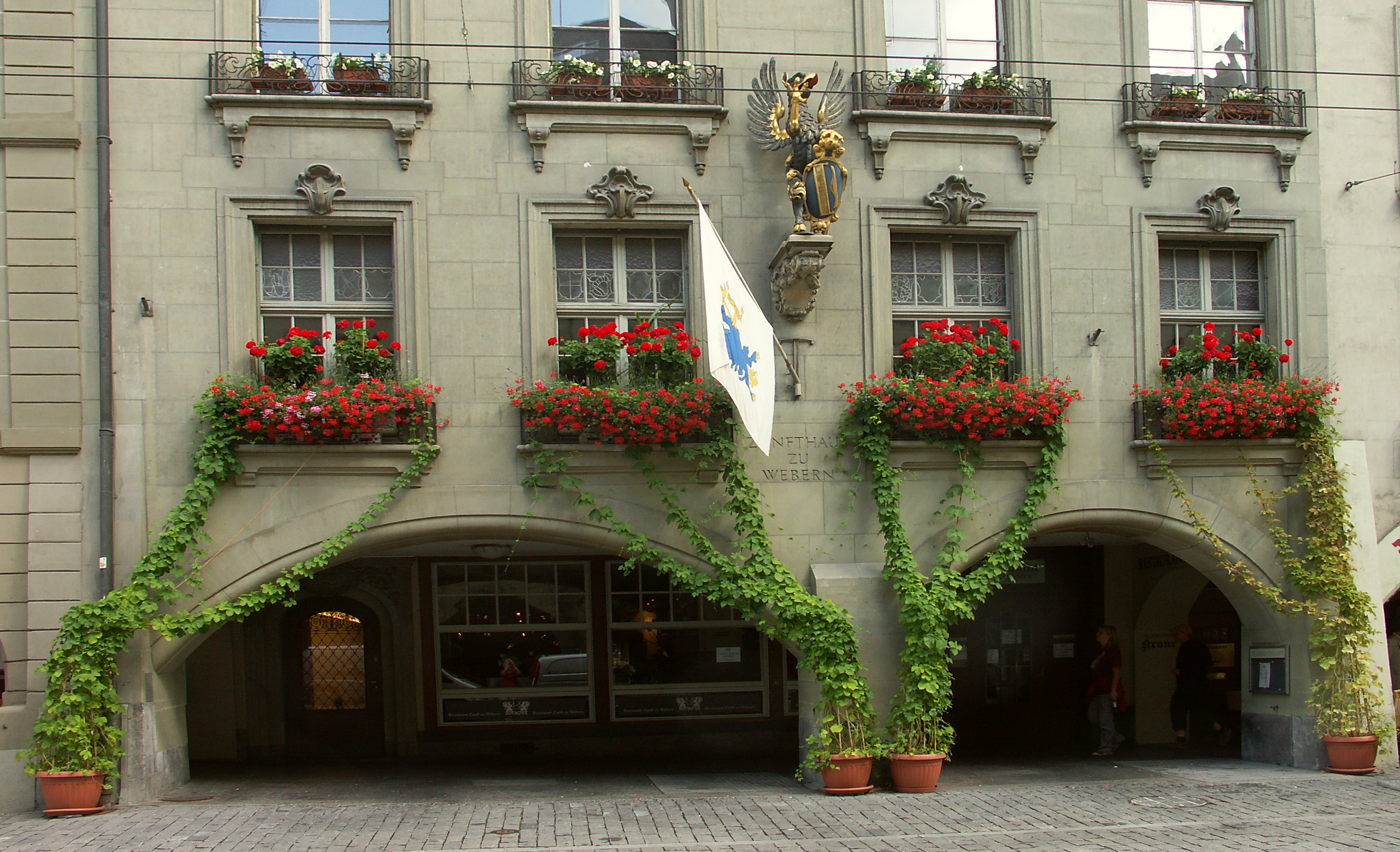 Altstadt von Bern